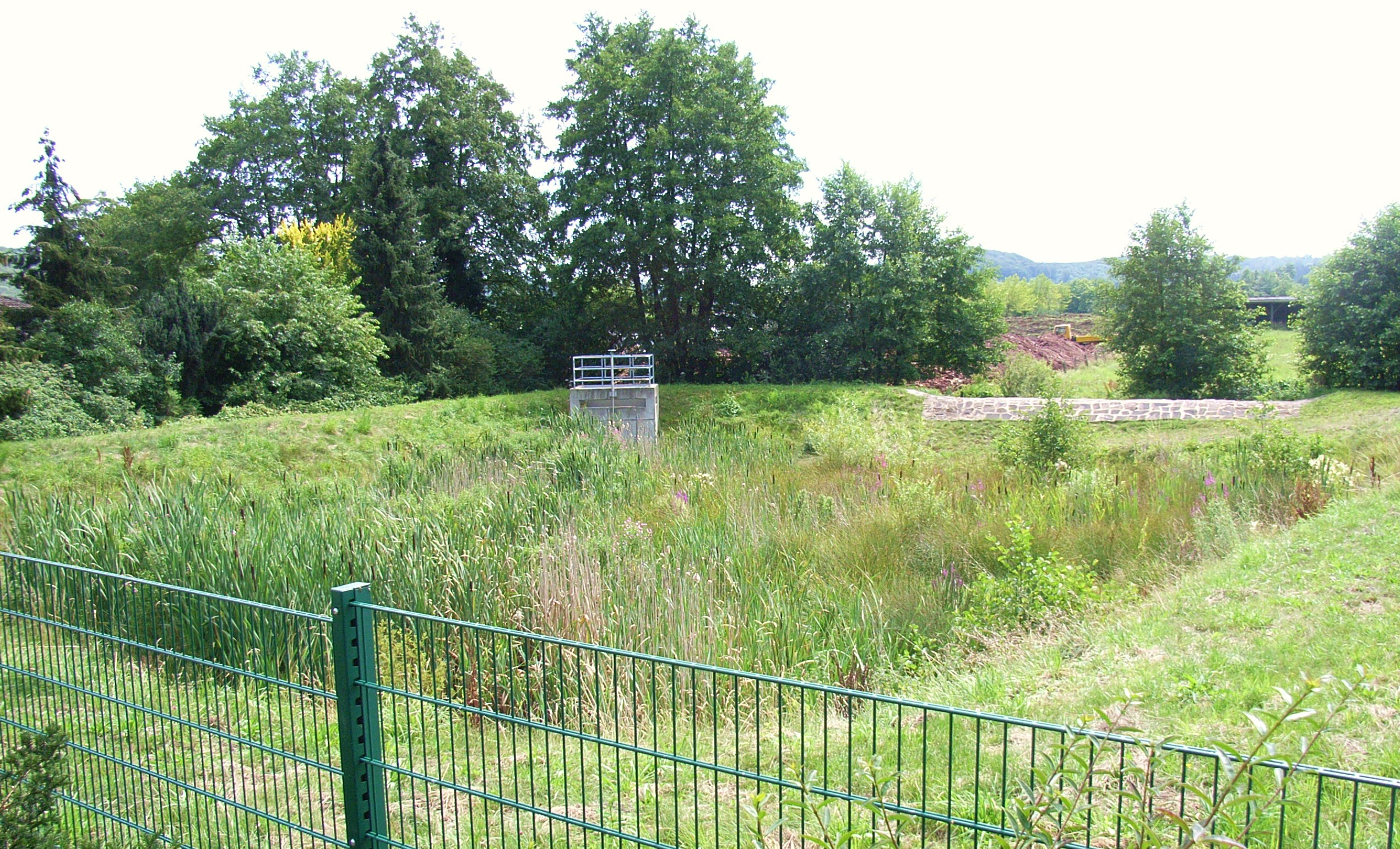 Ein kleines Retentionsbecken befindet sich im Oberlaufe, dort wo die Straße Hilgenbach, den bach quert.